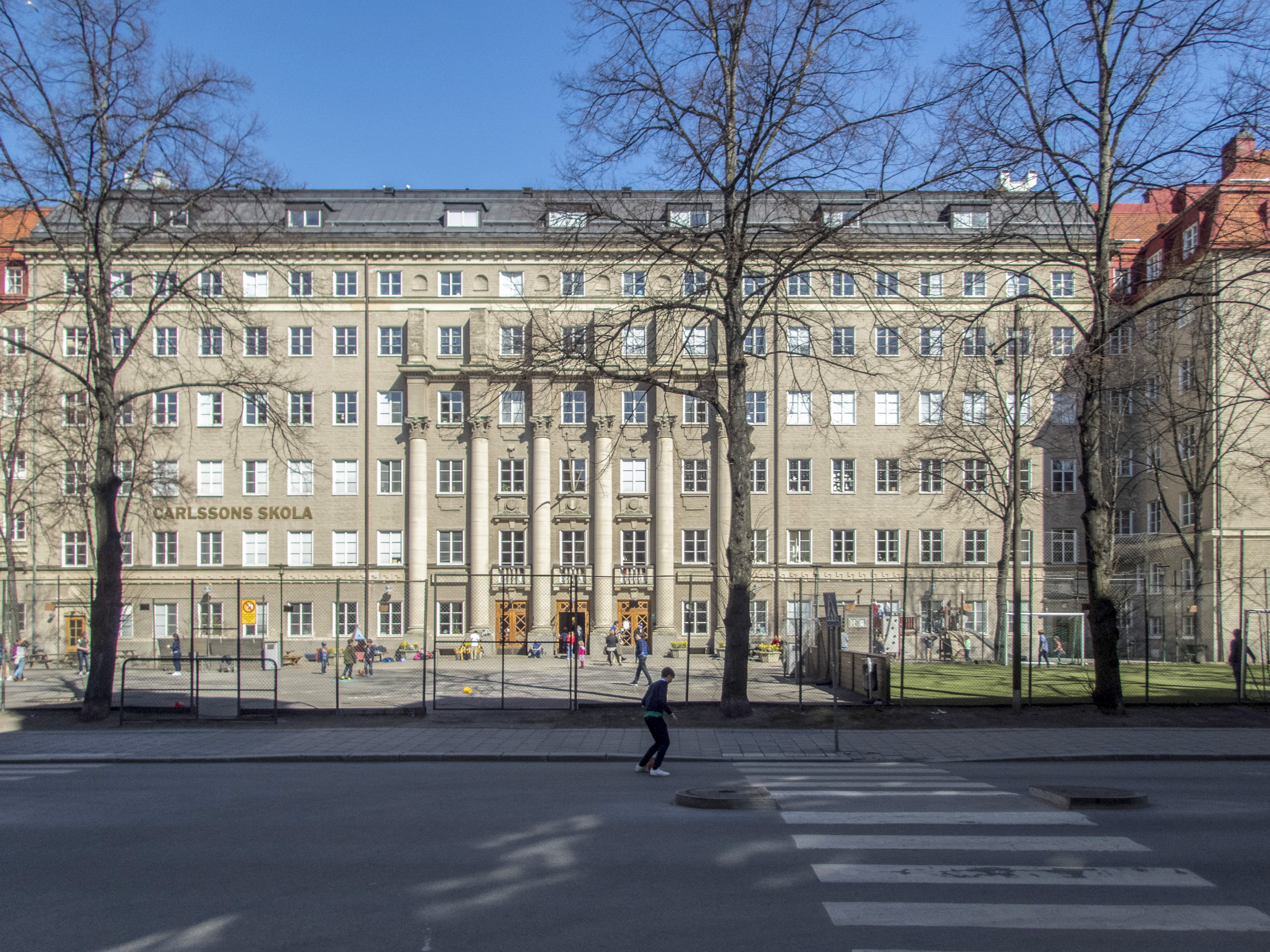 Carlssons skola, Brandvakten 7, Kommendörsgatan 31 Stockholm, Nybyggnadsår 1925 - 1927 Ahlströmska Skolans Byggnads AB (Byggherre) Albin Stark (Arkitekt) Contractor AB (Byggmästare)